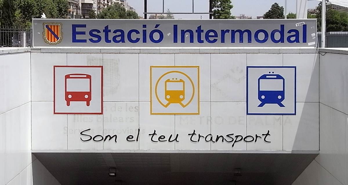 Eingang zum Bahnhof der SFM an der Plaça de Espanya in Palma (Mallorca)